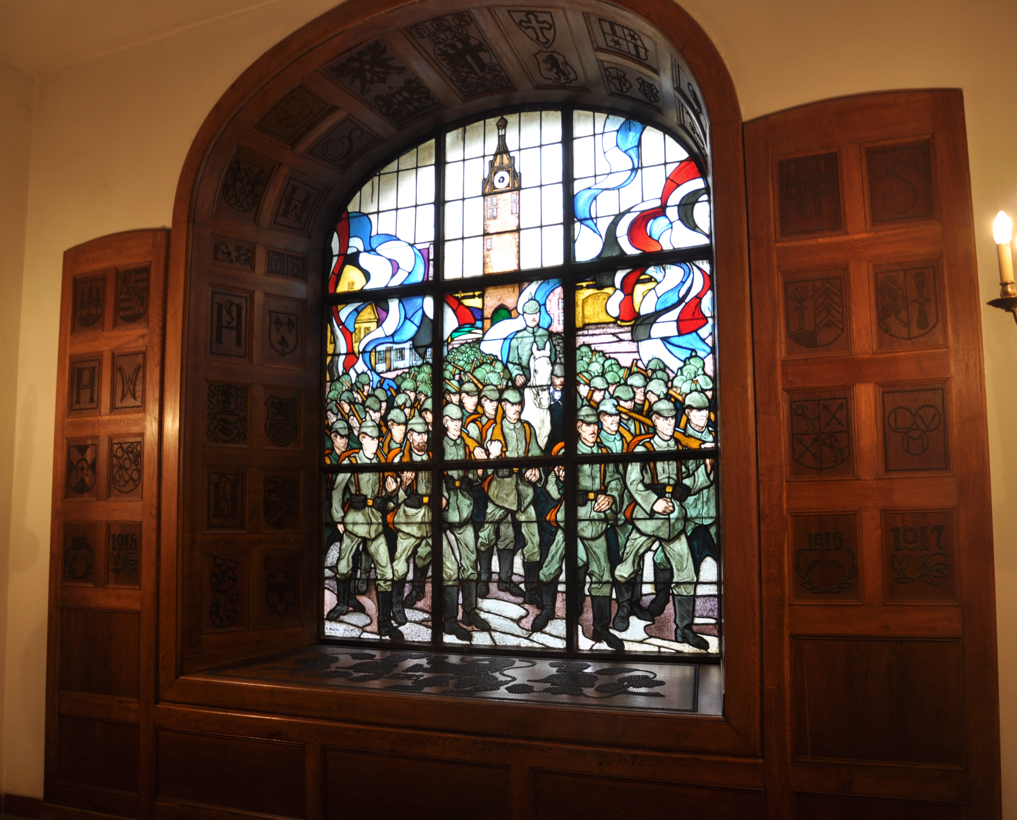 Memmingen, Rathaus, Treppenhaus, „Kriegswahrzeichen“ von 1918 (bestehend aus einem Glasfenster mit Soldatenmotiv und Nagelbildern mit Wappen)